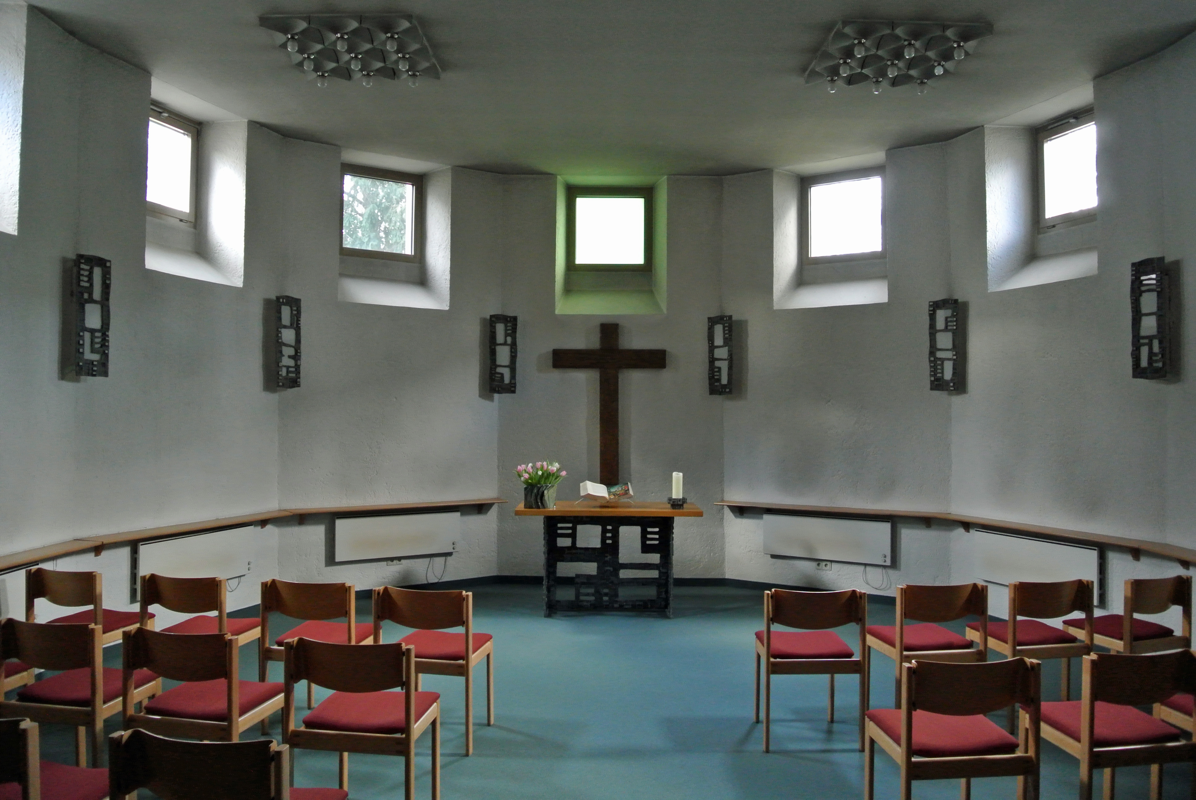 Christuskirche im Frankfurter Westend 1883 von Aage von Kauffmann errichtet, nach Kriegszerstörung 1977 als ökumenisches Zentrum neu gebaut, evangelische Kapelle